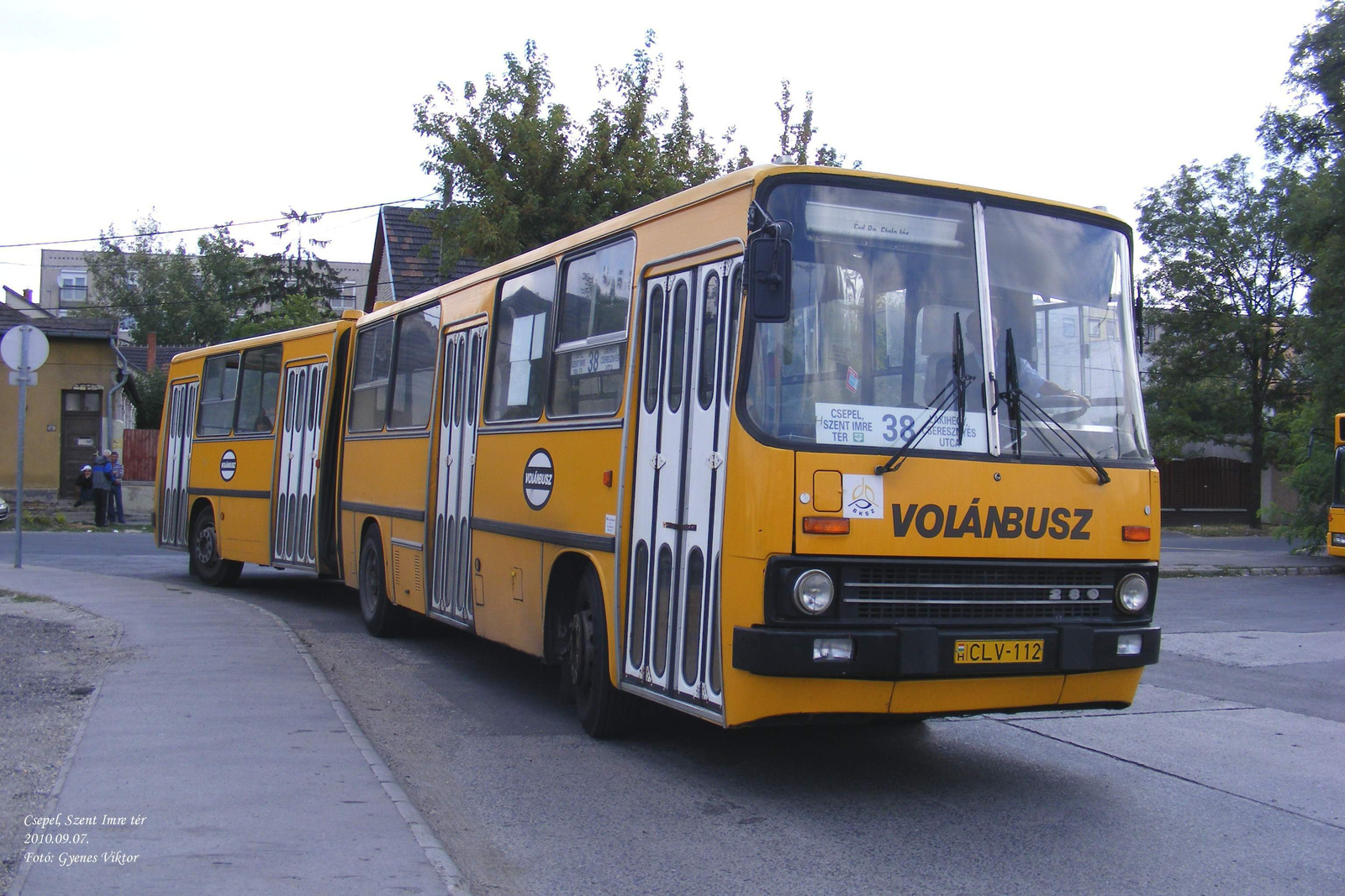 38-as jelzésű Ikarus 280-as busz a Szent Imre téren